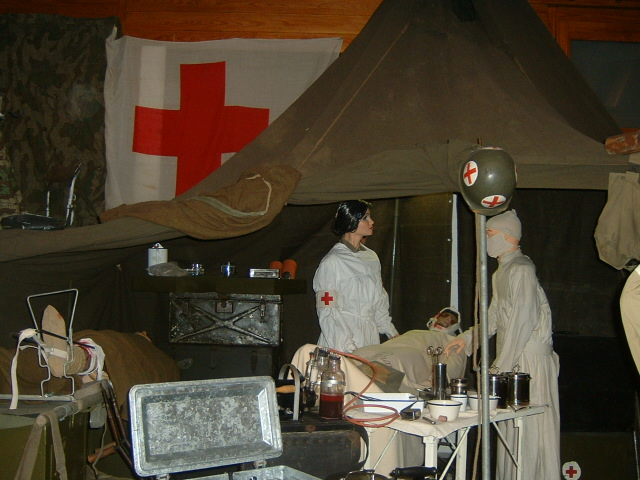 Sanitätszelt (US) 2. Weltkrieg im National Museum of Military History in Diekirch in Luxembourg (Luxembourg)